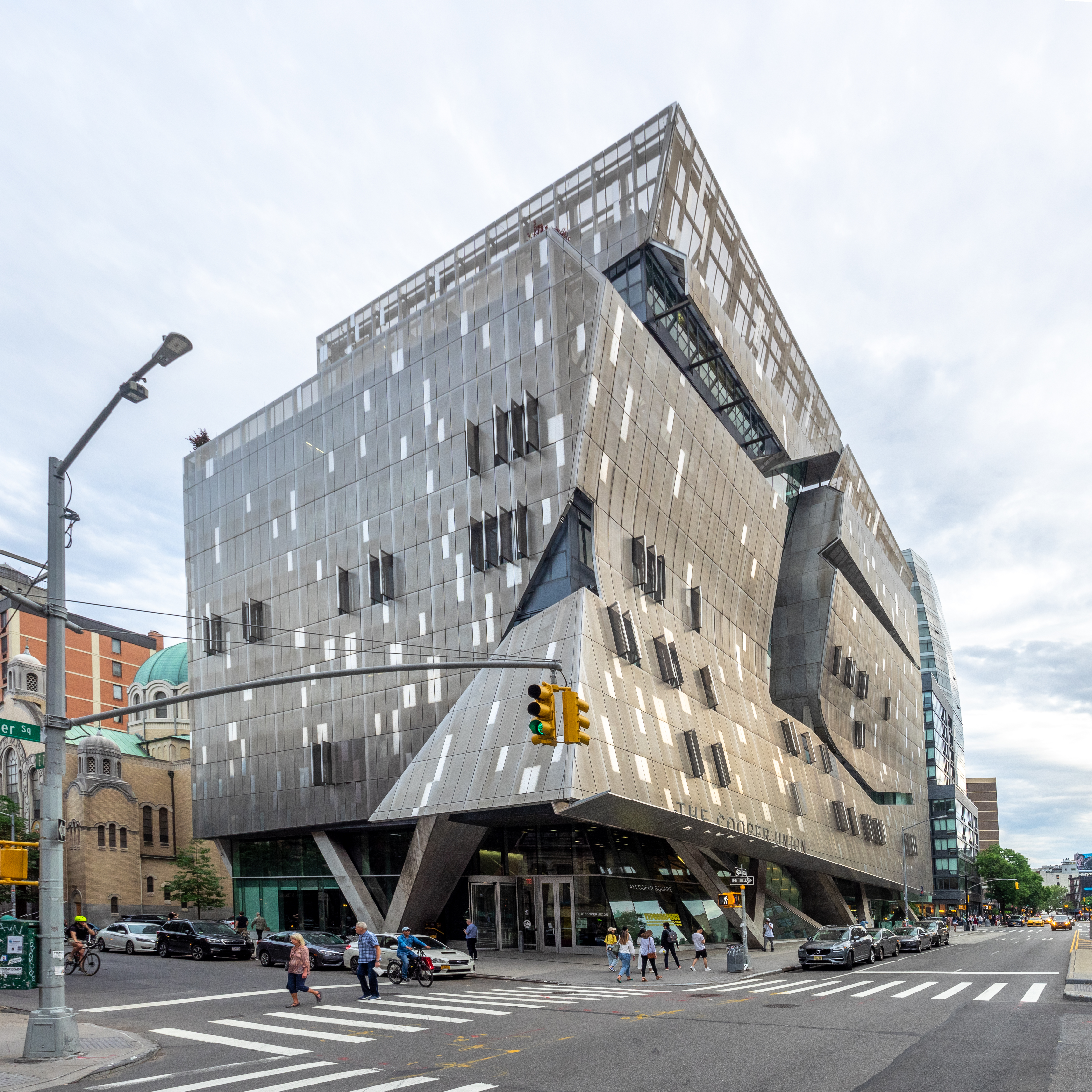 East Village, NYC